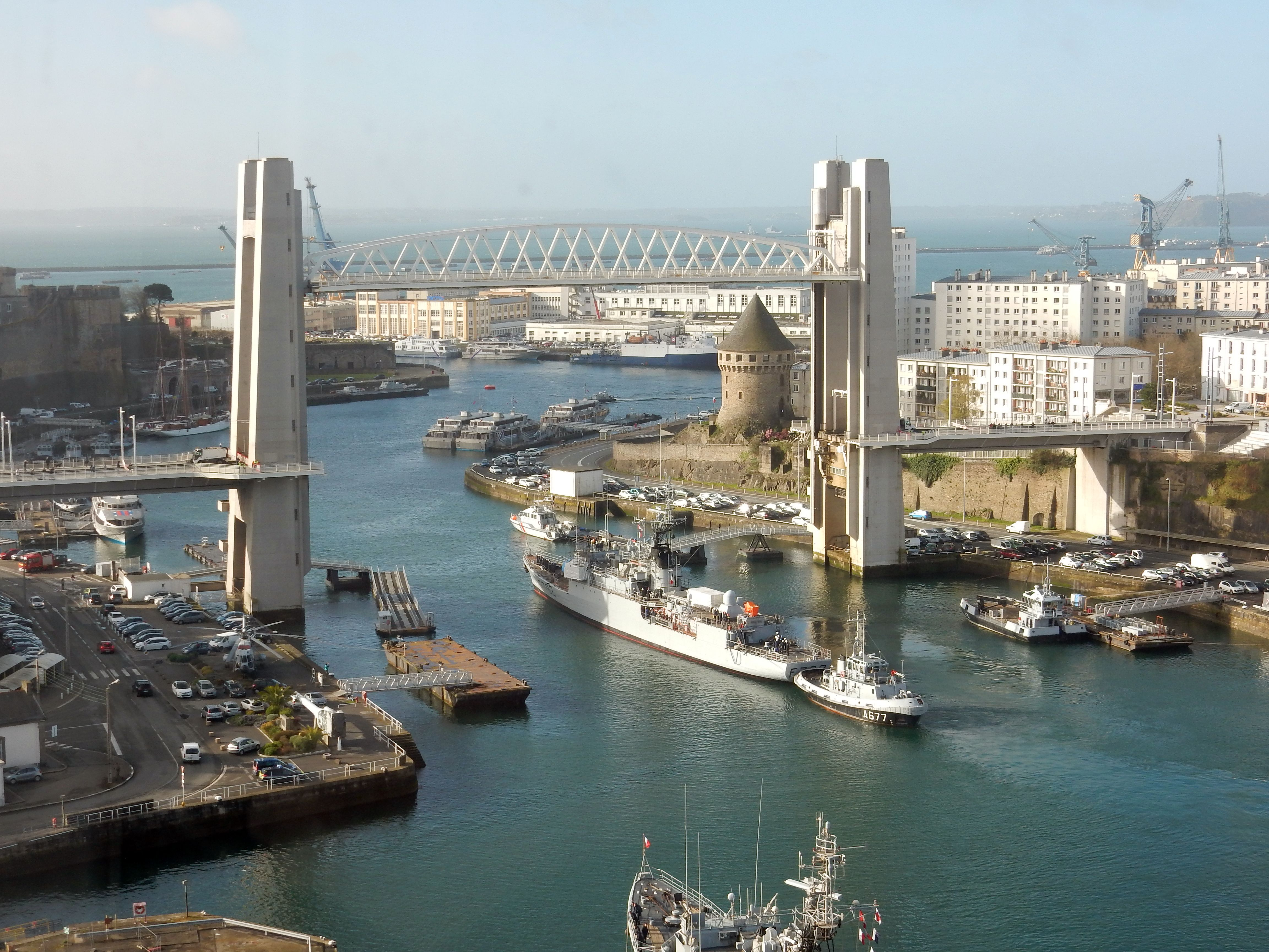 Pont de Recouvrance